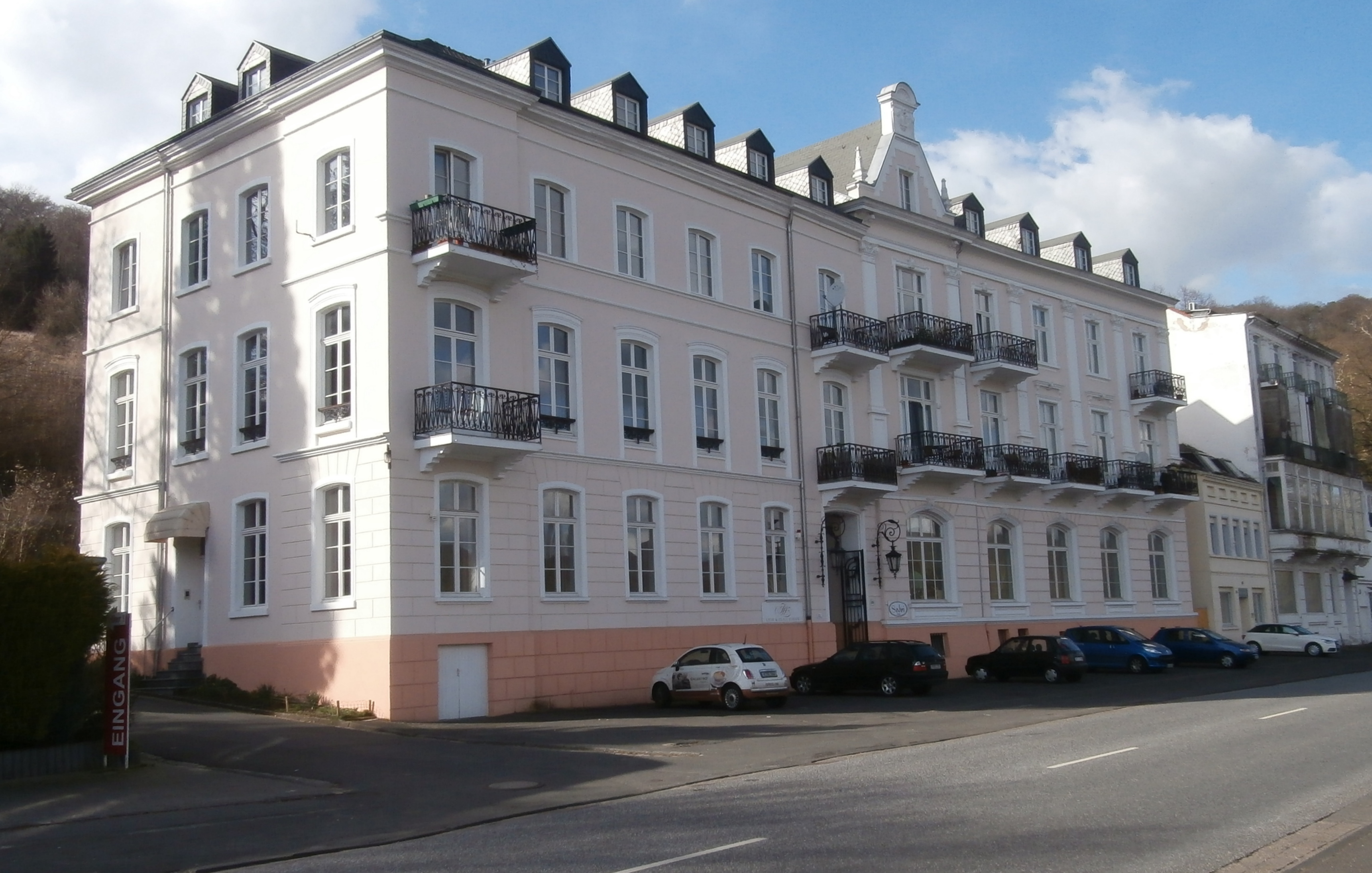 Ehem. Hotel Rolandseck-Groyen, Mainzer Straße 28/30 (Bundesstraße 9), Rolandswerth